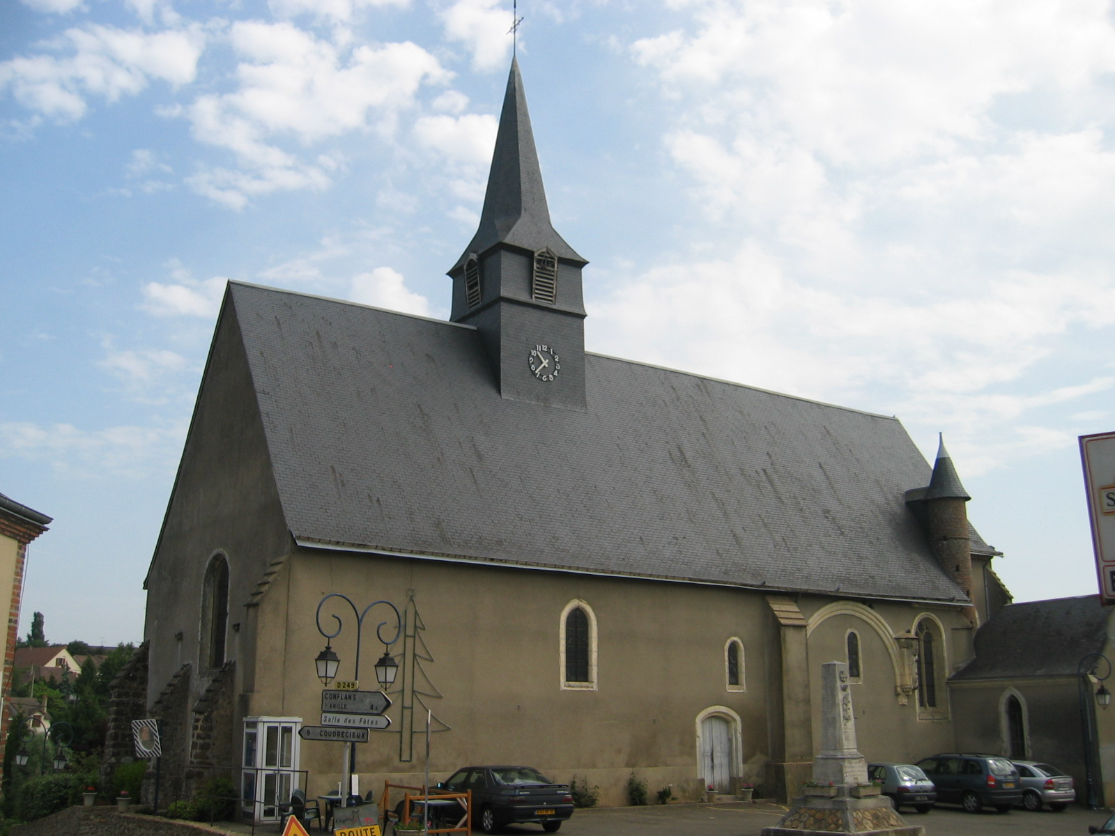 Eglise Saint-Jean-Baptiste, Montaillé (72 Sarthe)